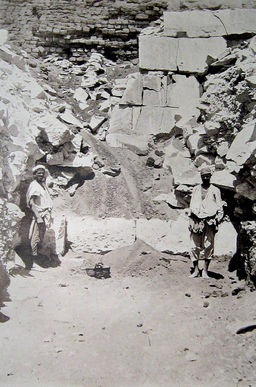 Parement de la pyramide d'Amenemhat III à Dahchour